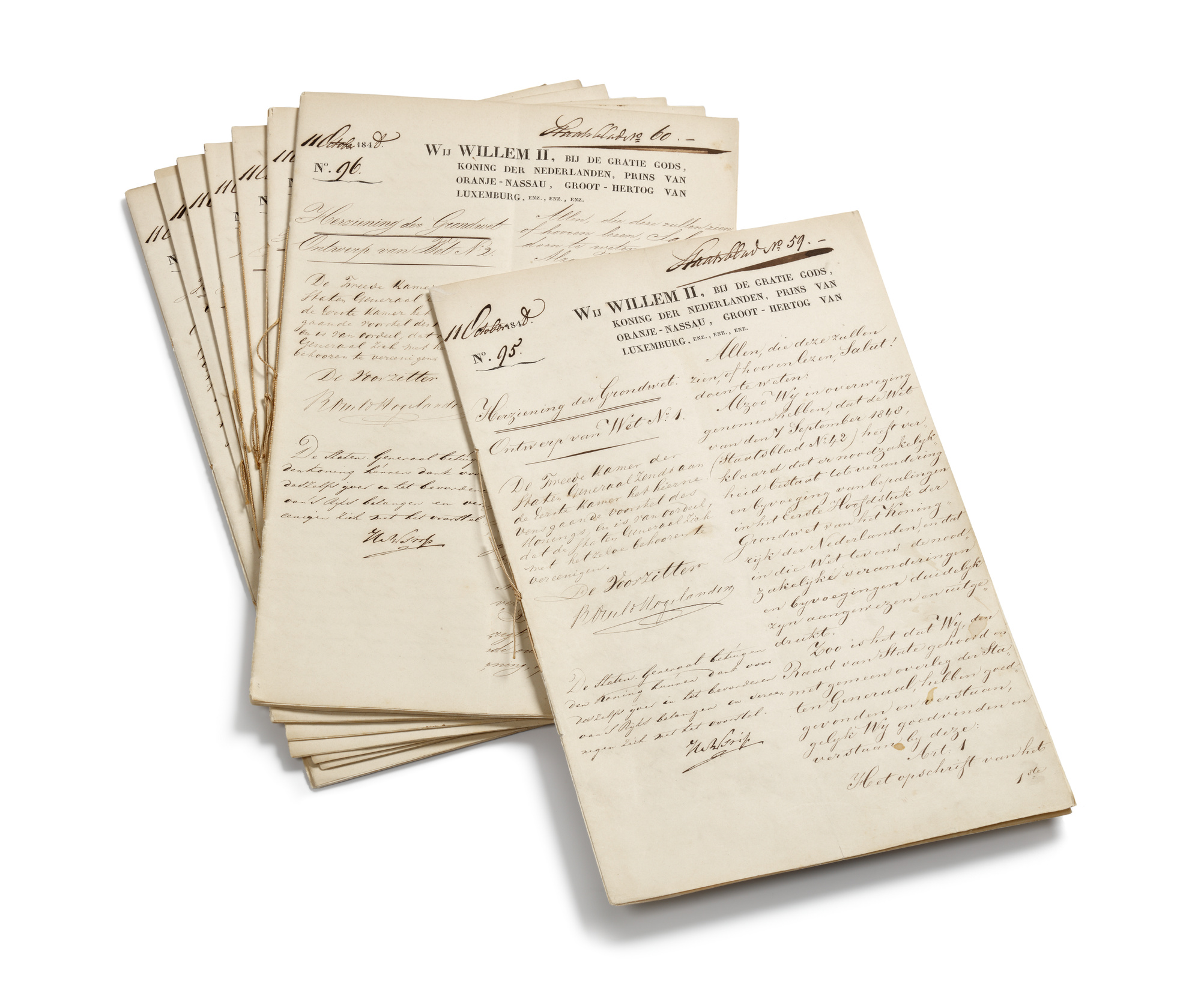 Grondwetswijziging 1848 Kabinet des Konings, Kabinet der Koningin, inventarisnummer 514